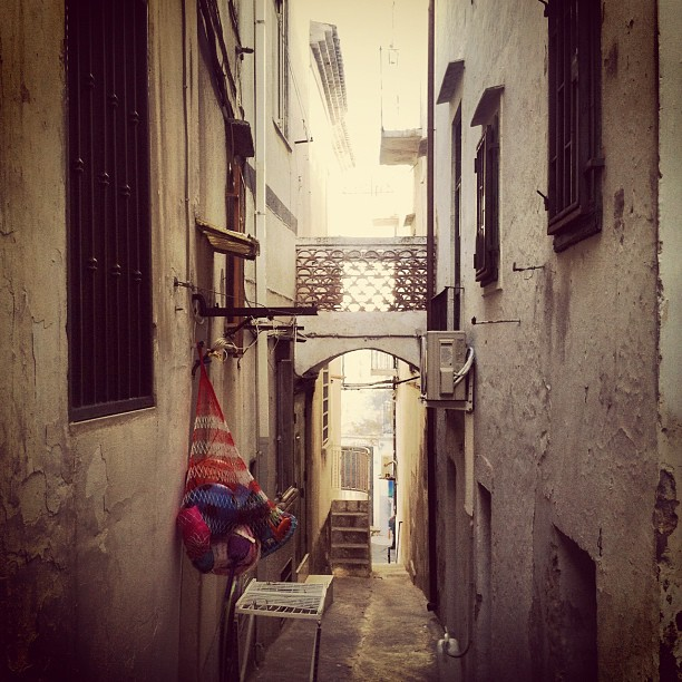 Arco di Via Tirolo (Rodi Garganico, Puglia, Italia)